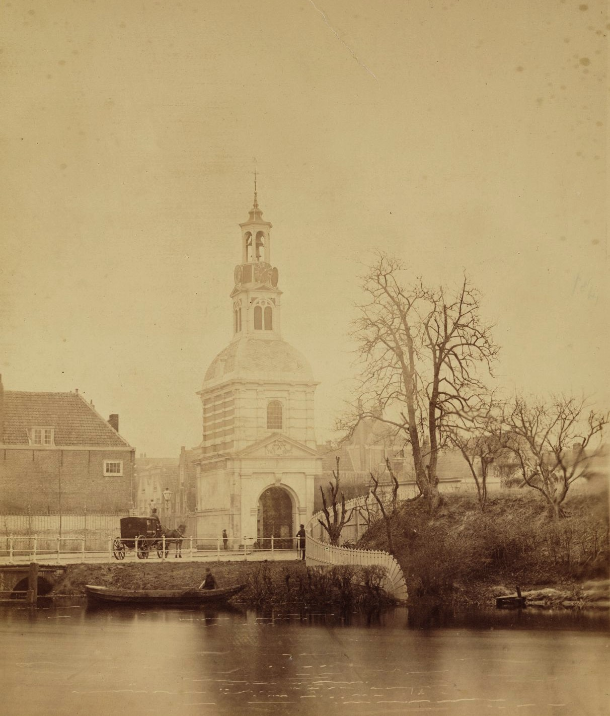 Foto van Jan Goedeljee.Photograph of the Leiden Witte Poort (binnenpoort) city gate by Jan Goedeljee.